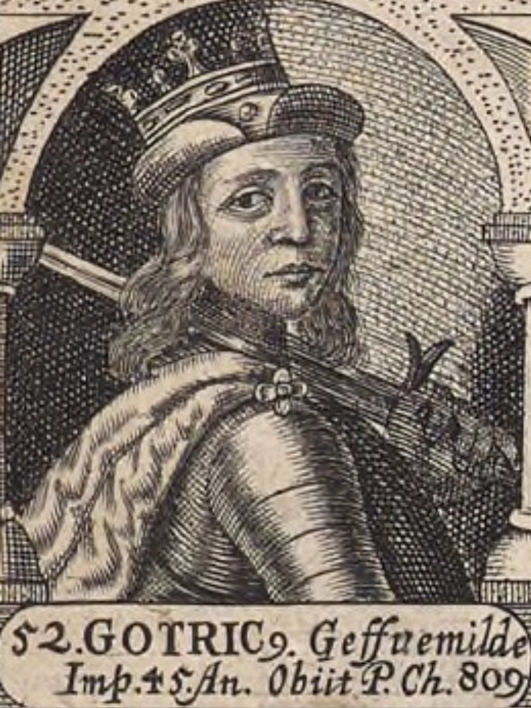 Mindre udsnit forestillende den danske konge Gøtrik/Godfred fra "Veræ effigies regum omnium qvi a primo Dan usqe Christianum IV modo regnantem imperii Danici gloria eminuerunt" udgivet i 1670 af Erico Olai Tormio.